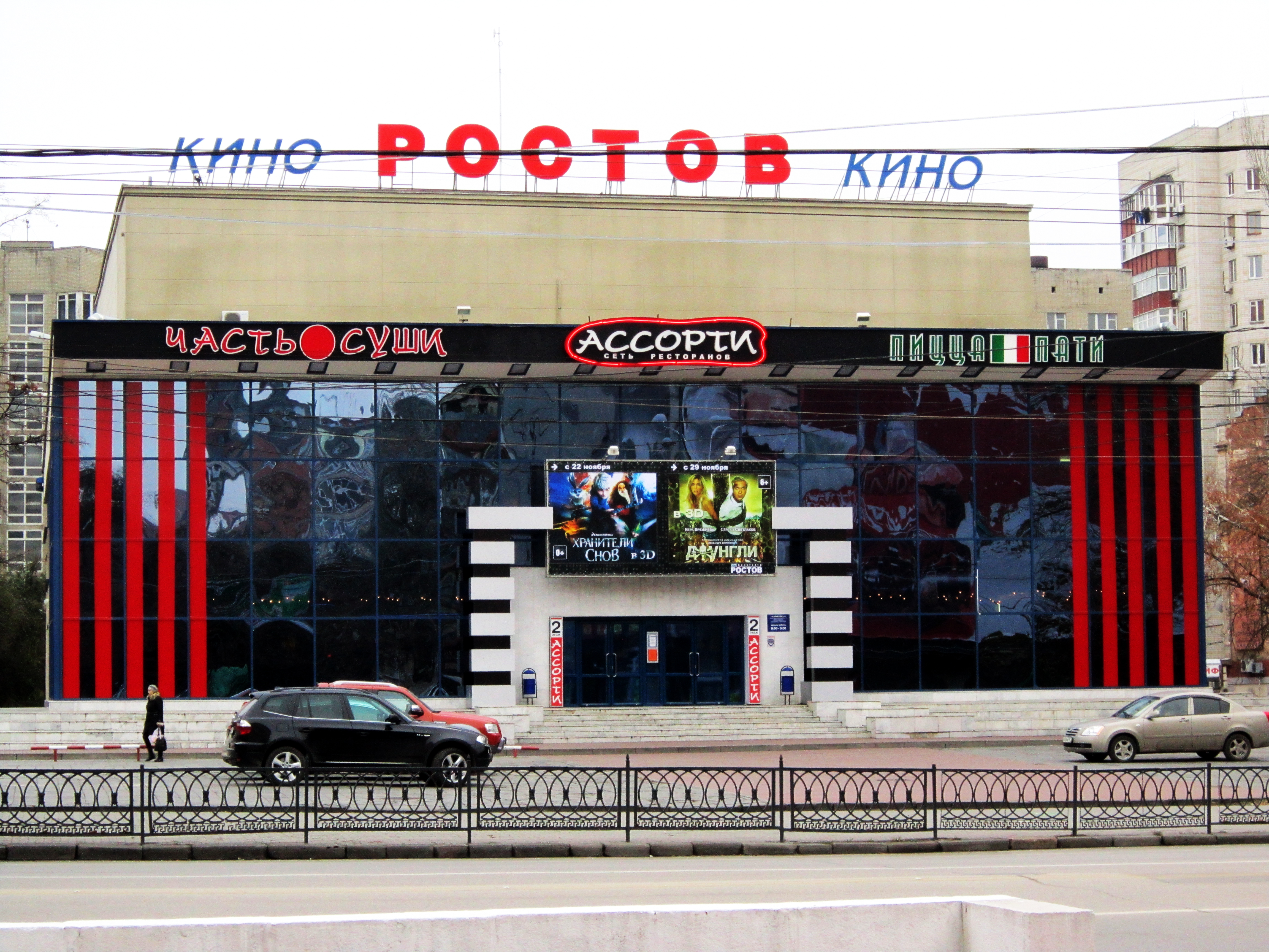 Кинотеатр Ростов (Ростов-на-Дону)